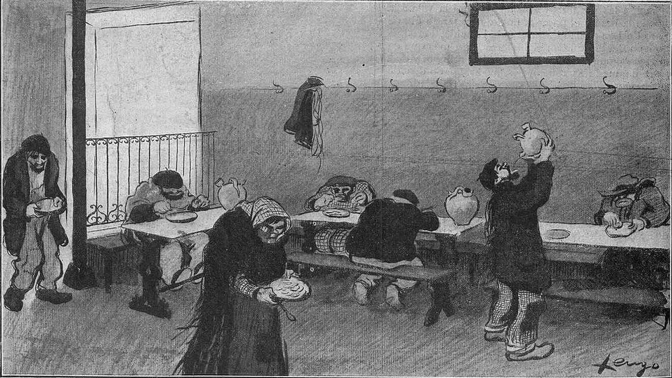 La tienda asilo de Madrid, caricatura de Lengo.